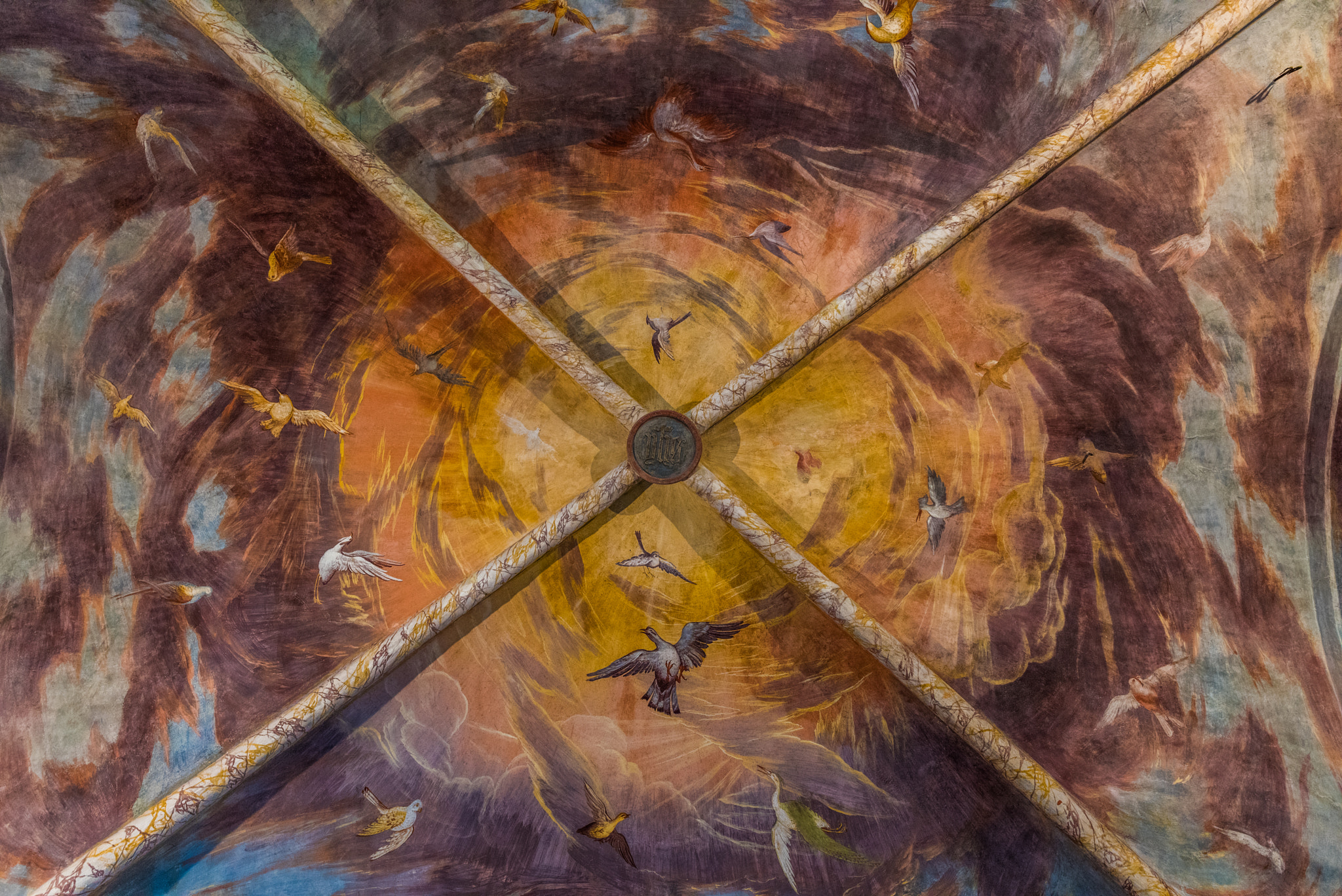 500px provided description: Volta